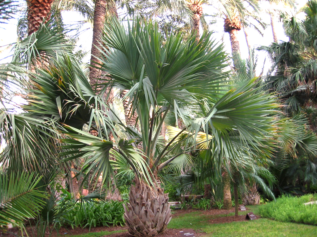 Sabal maritima en el Huerto del Cura